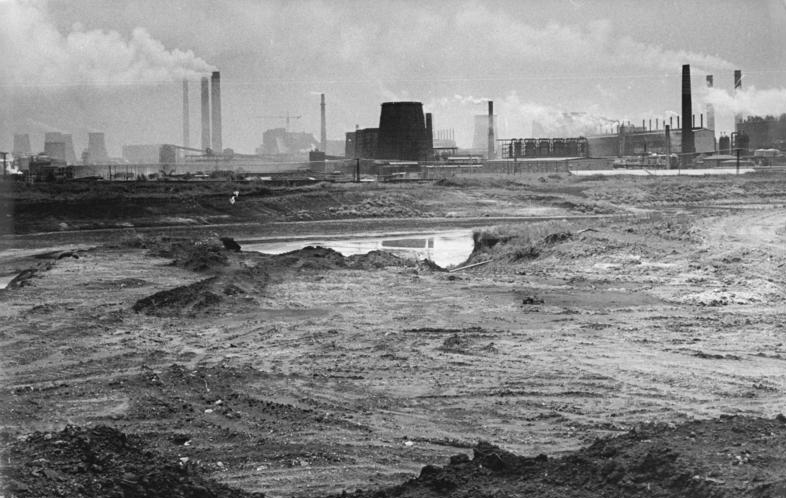 Espenhain, Braunkohleveredelungswerk ADN-Waltraud Grubitzsch 13.7.90 Bez. Leipzig-Dreckigstes Dorf Europas- Aus den Schloten des Braunkohlenveredelungswerkes Espenhain ziehen seit Jahrzehnten ätzende Staubwolken und Gasgerüche über das Bornaer Land. Das benachbarte Dorf Mölbis errang in den letzten Jahren bereits den traurigen Titel "dreckigstes Dorf Europas". Ab August soll der Umweltsünder Nummer eins erst einmal "dichtmachen". Die Mölbiser hoffen auf eine bessere und saubere Zukunft.